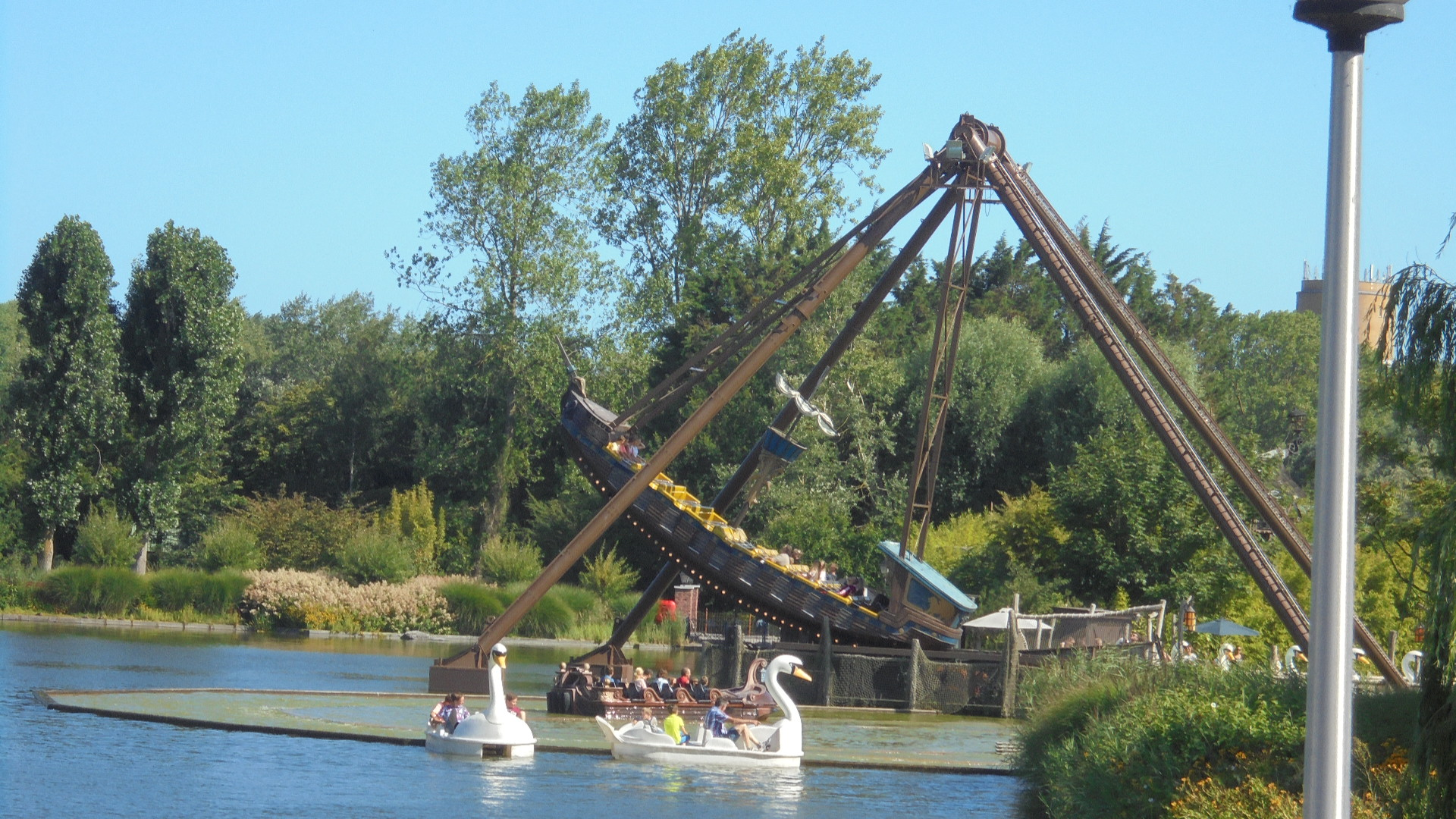 De Piratenboot